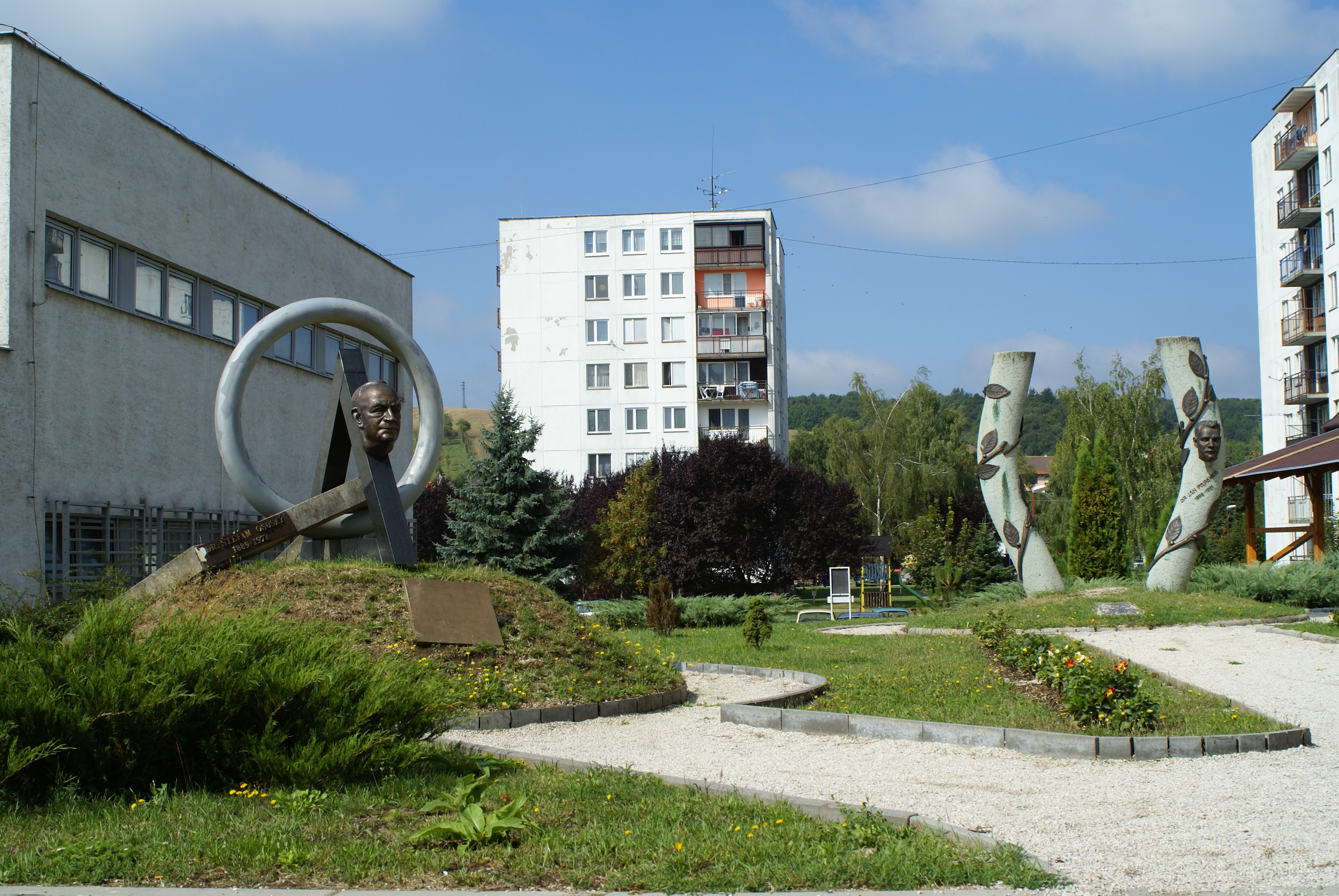 Štefan Osuský (pamätník vľavo) a Ján Papánek (pamätník vpravo), Brezová pod Bradlom, Slovensko